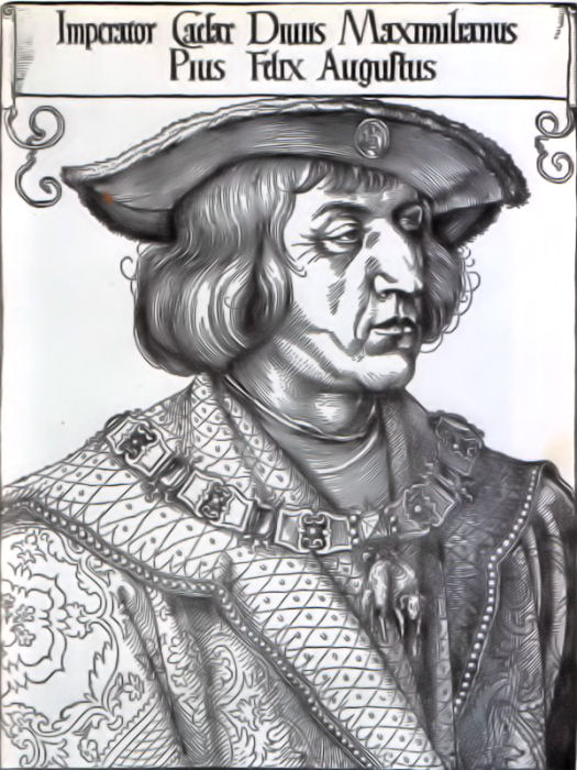 Maximilian I.